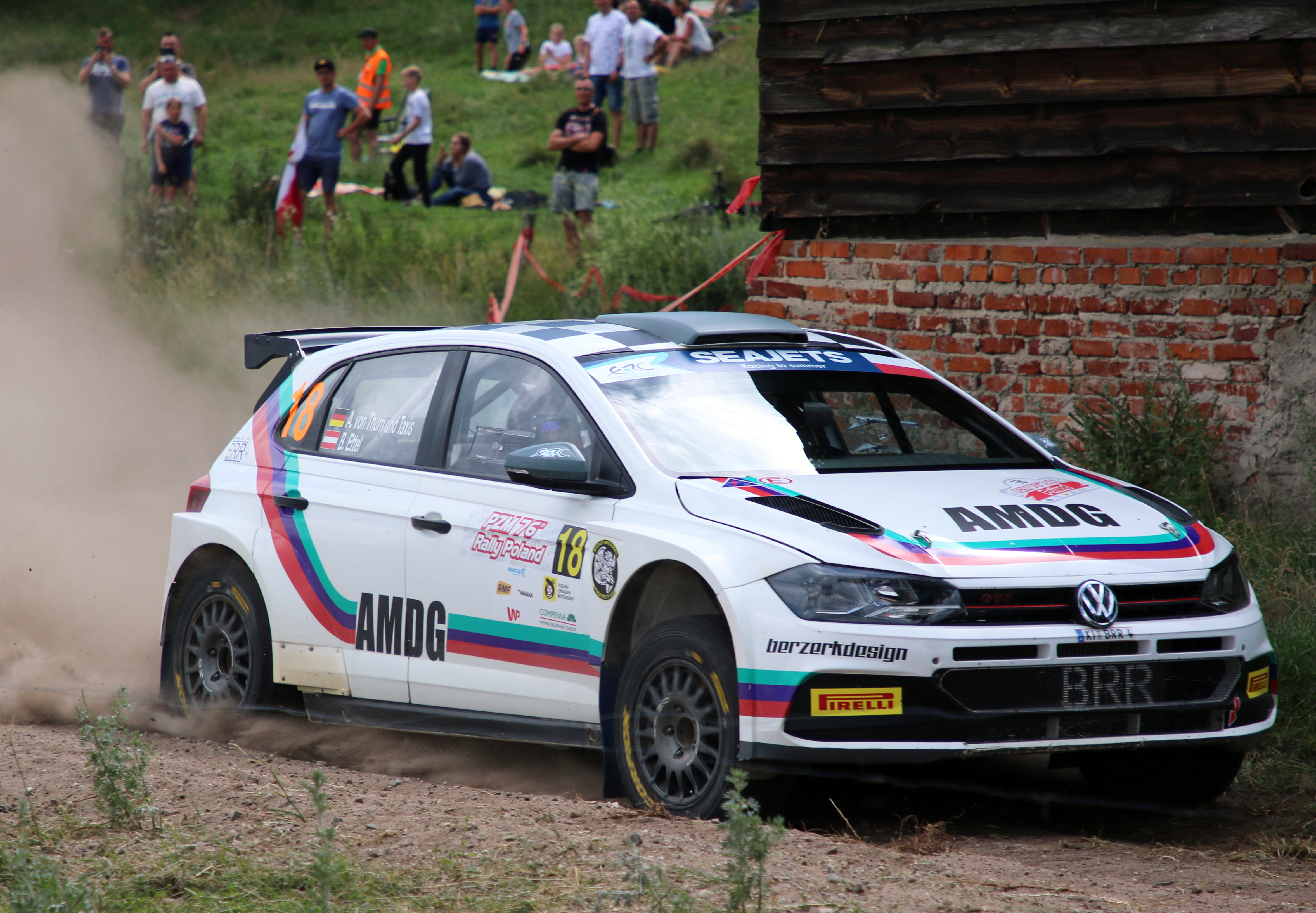 Albert von Thurn und Taxis podczas Rajdu Polski 2019